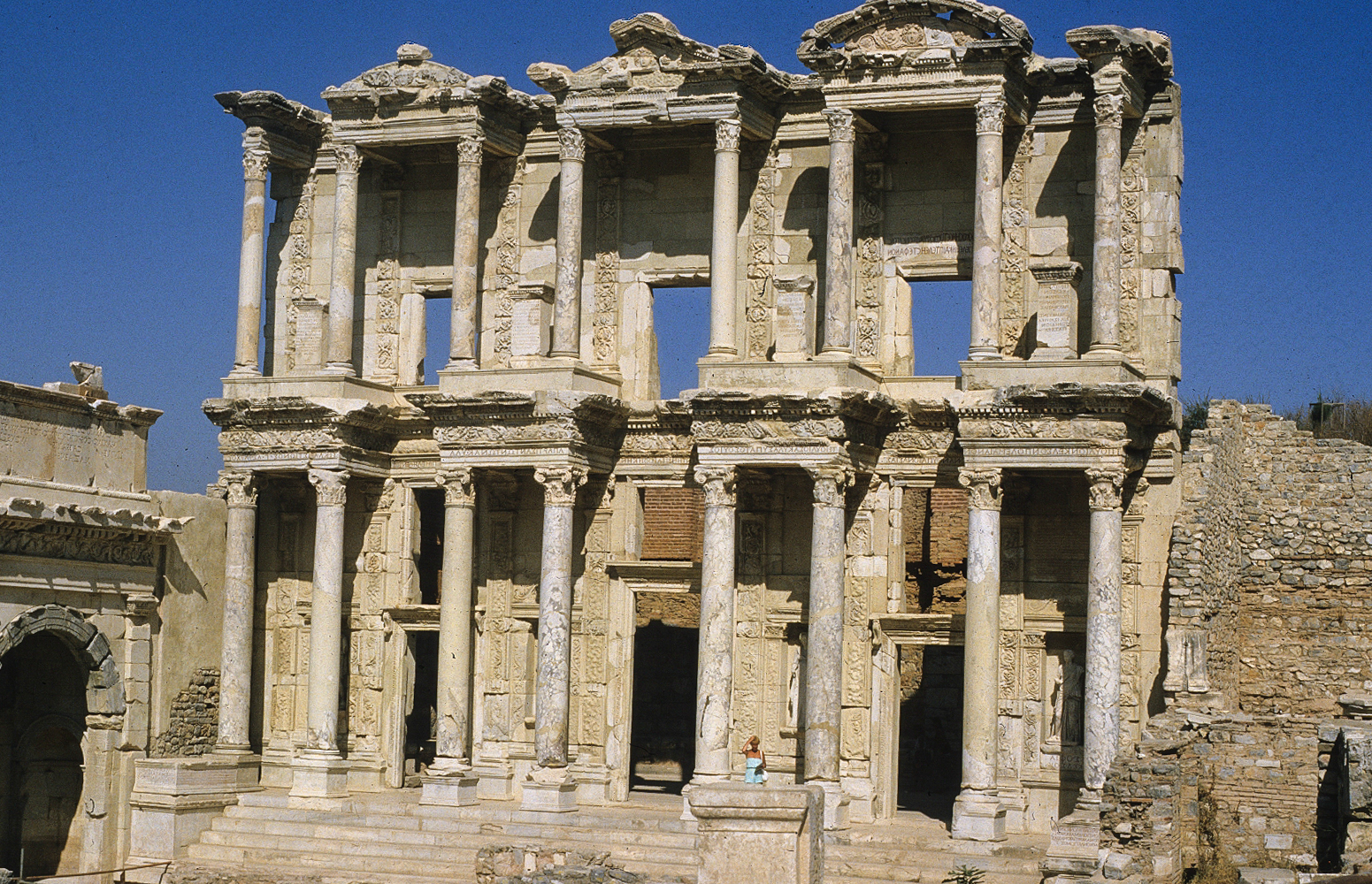 Celsus Bibliothek in Ephesus